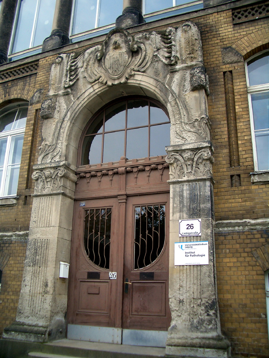 Uniklinik Leipzig, Liebig-Straße